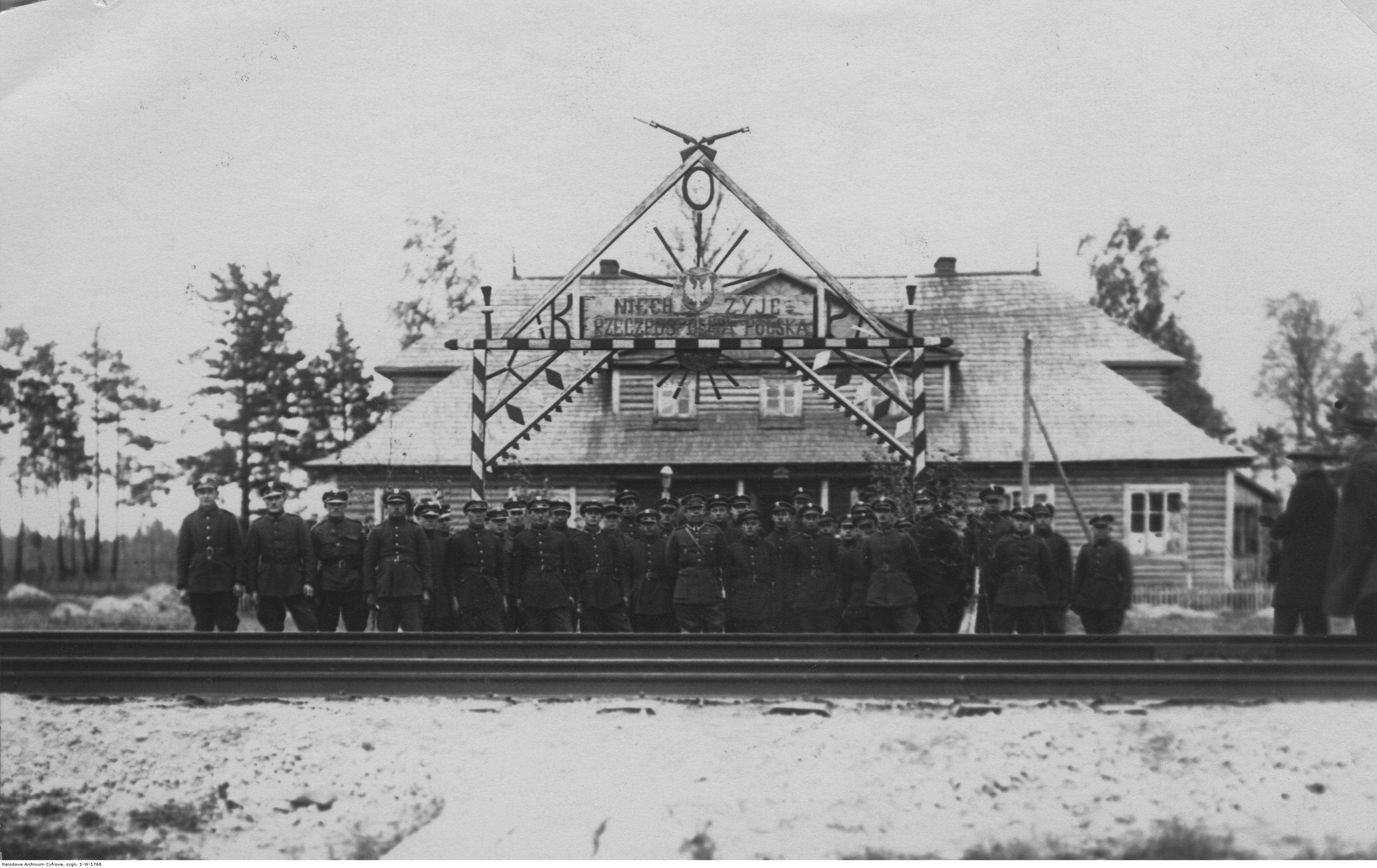 Fotografia grupowa żołnierzy Korpusu Ochrony Pogranicza przed strażnicą w okolicy Stołpc; 1926 r. Koncern Ilustrowany Kurier Codzienny - Archiwum Ilustracji.